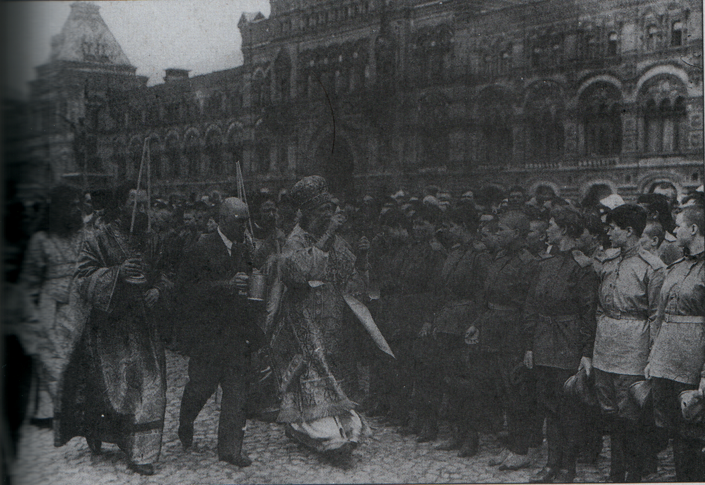 El arzobispo metropolitano Nikon bendice al «batallón de la muerte» formado por mujeres antes de partir al frente en junio de 1917.